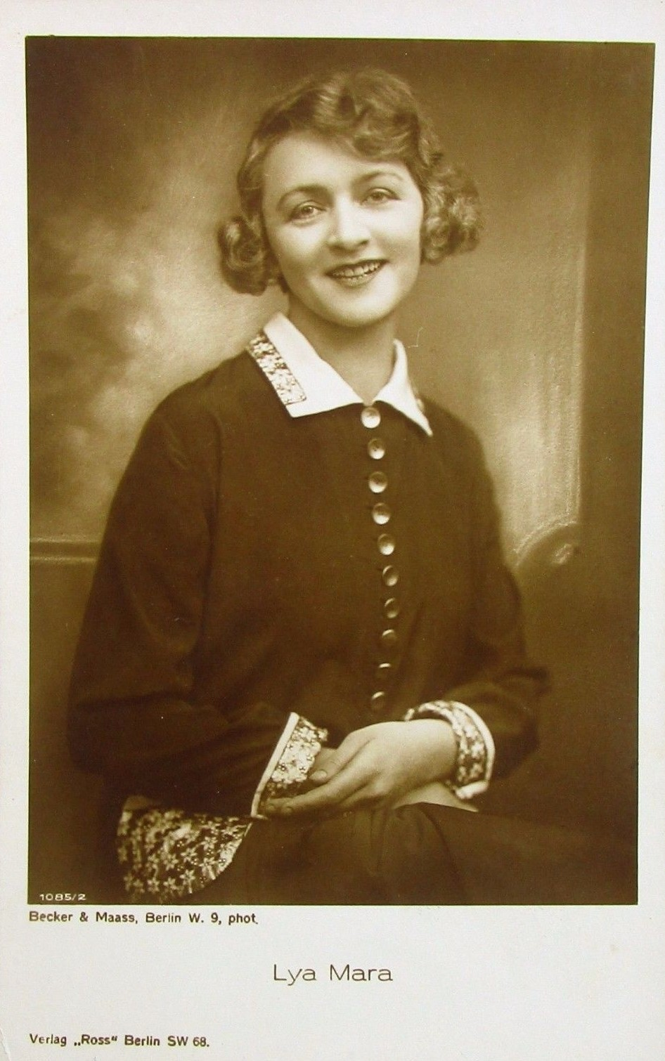 Lya Mara. Photopostkarte des Ateliers (Otto) Becker & (Heinrich) Maass. Ross Verlag This image is a movie star postcard published by Ross Verlag in Berlin. This is image nr. 1085/2 from their series. It was published ca. 1927–1929. This tag does not indicate the copyright status of the attached work. A normal copyright tag is still required. See Commons:Licensing for more information. In particular, Ross images are in the public domain in Germany only if it can be shown that the photographer (usually mentioned on the image itself) has died more than 70 years ago. Ross images that are in the public domain in Germany may still be copyrighted in the United States if they were first published later than 1922 and were still copyrighted in Germany on January 1, 1996 (i.e. if the photographer died in 1926 or later).